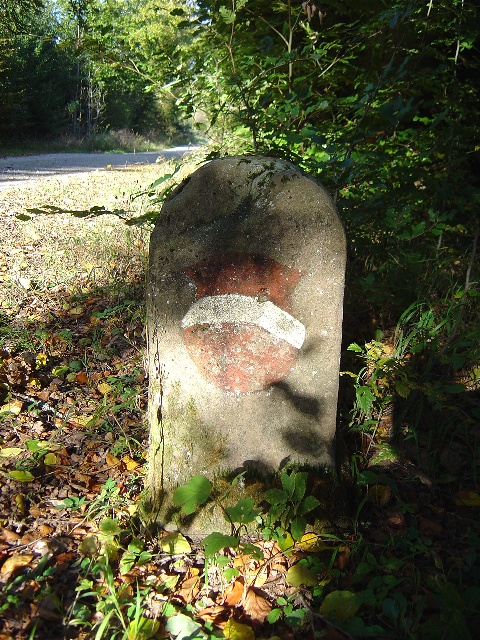 Grenzstein zwischen dem abgegangenen Dorf Rappertshäusern und Möhlin. Der Grenzstein aus dem Jahr um 1600 trägt das österreichische Wappen und auf der Rückseite die Inschrift "RAP". Standort: An einem Waldweg im Gebiet "Unterforst" der Gemeinde Möhlin.